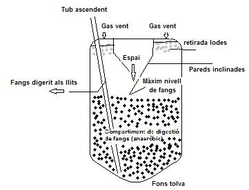 Figura 4. Esquema del sistema tanc d'Imhoff.